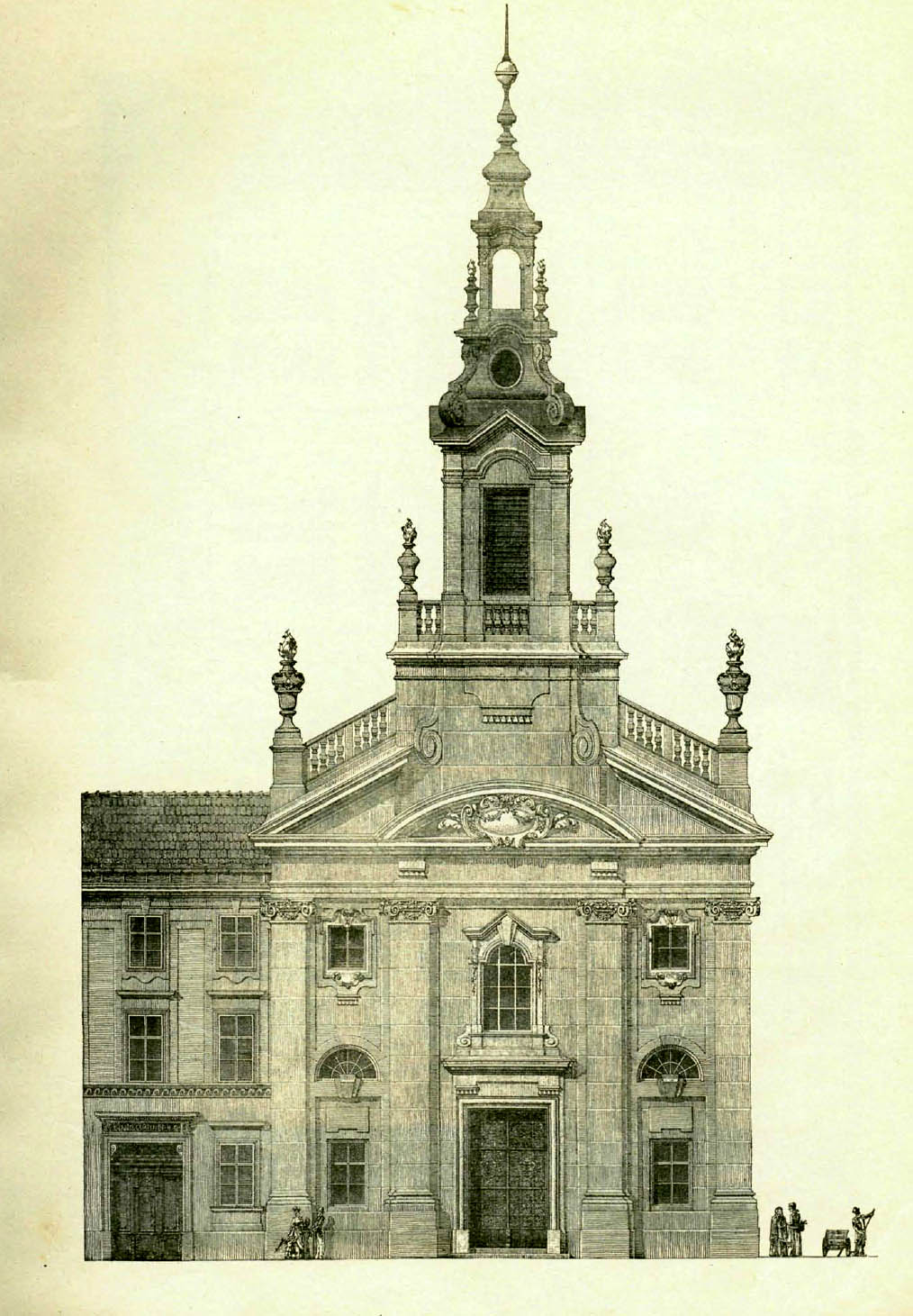 Фасад протестантської церкви у Відні. Архітектор Ігнатій Совінський (1858—1917).